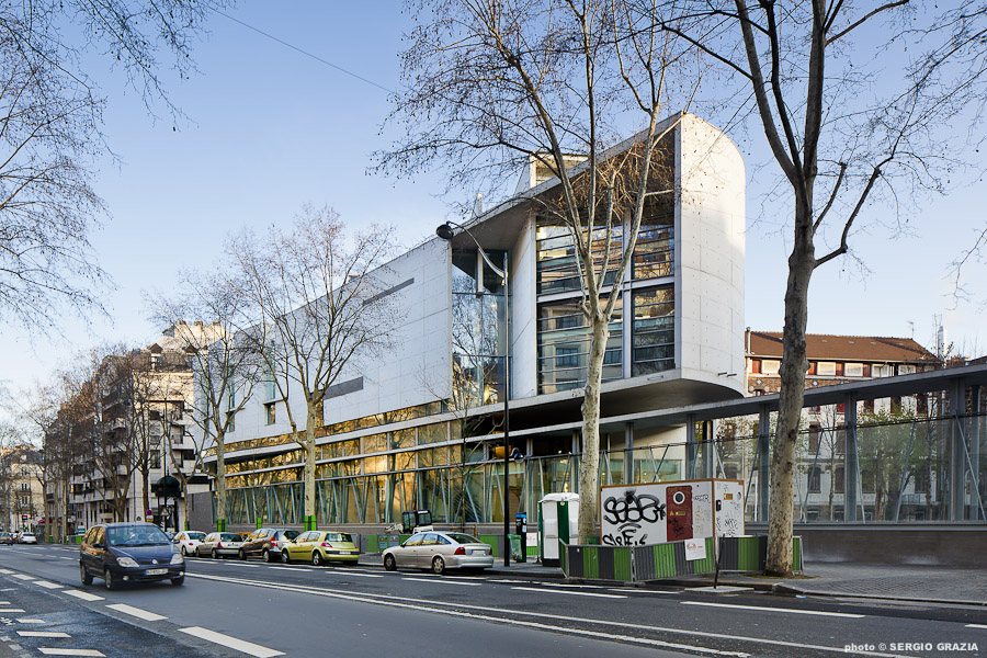 Lycée Carnot Paris XVII